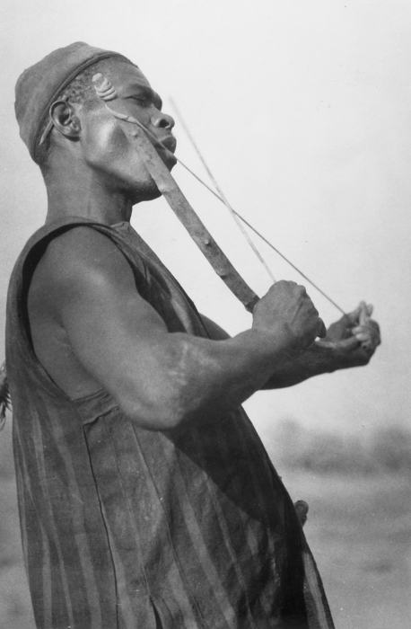 De opname is gemaakt tijdens één van de twee verzamelexpedities die het Tropenmuseum in 1970-1971 ondernam ter voorbereiding op de grote tentoonstelling in 1971-1972, getiteld 'Samo. Een Afrikaans Savannevolk in ontwikkeling'. De expedities duurden elk drie maanden en werden uitgevoerd door de heren J.T. Broekhuijse en F.M. Cowan. Een soortgelijke opname van deze man staat ook afgebeeld in de catalogus bij de hierboven genoemde tentoonstelling met het bijschrift 'Voor de muzikale begeleiding van feesten wordt wel gebruik gemaakt van de muziekboog' (1971: 12 en 13).